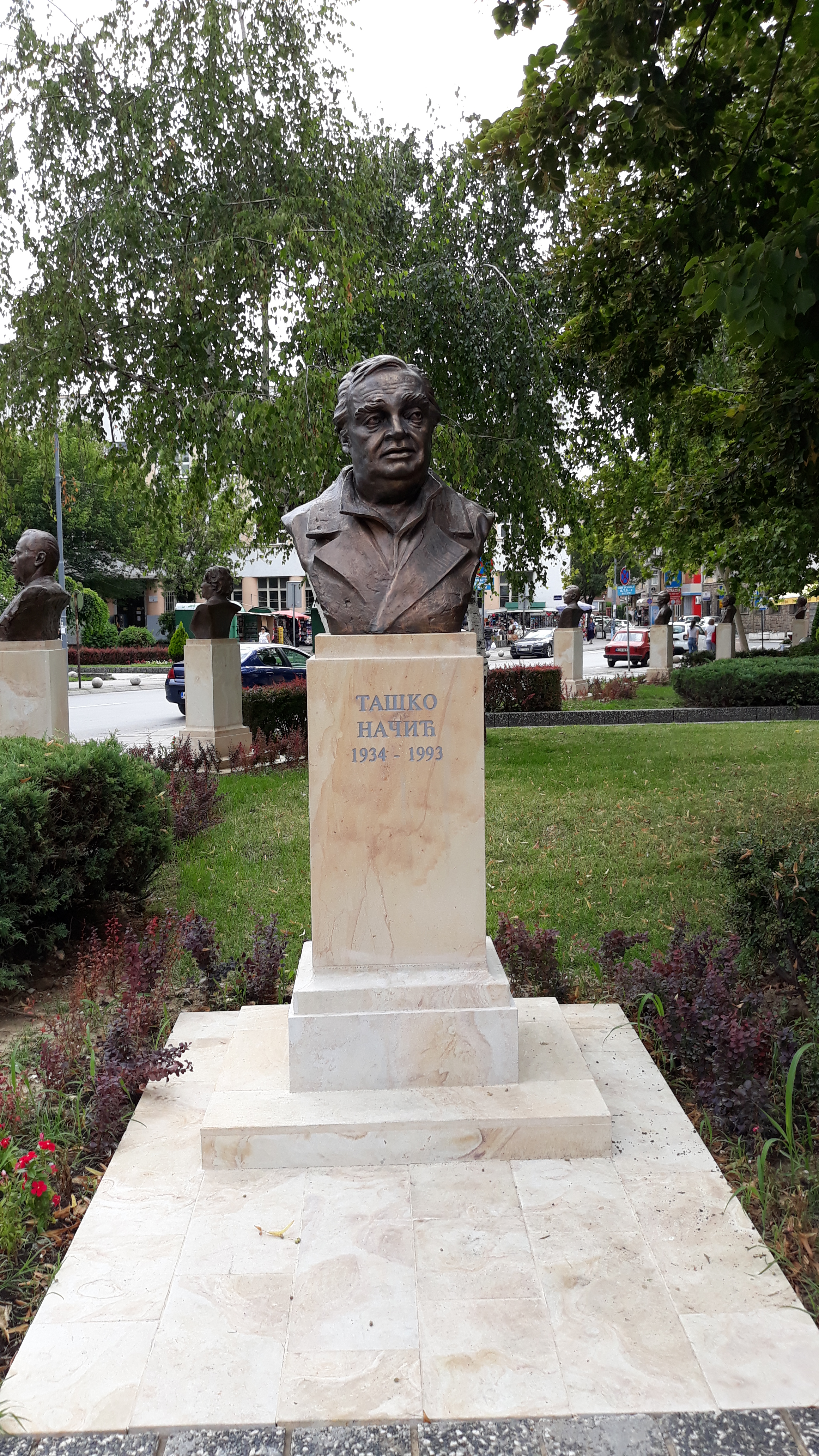 Биста Ташку Начићу испред зграде Културног центра у Крушевцу